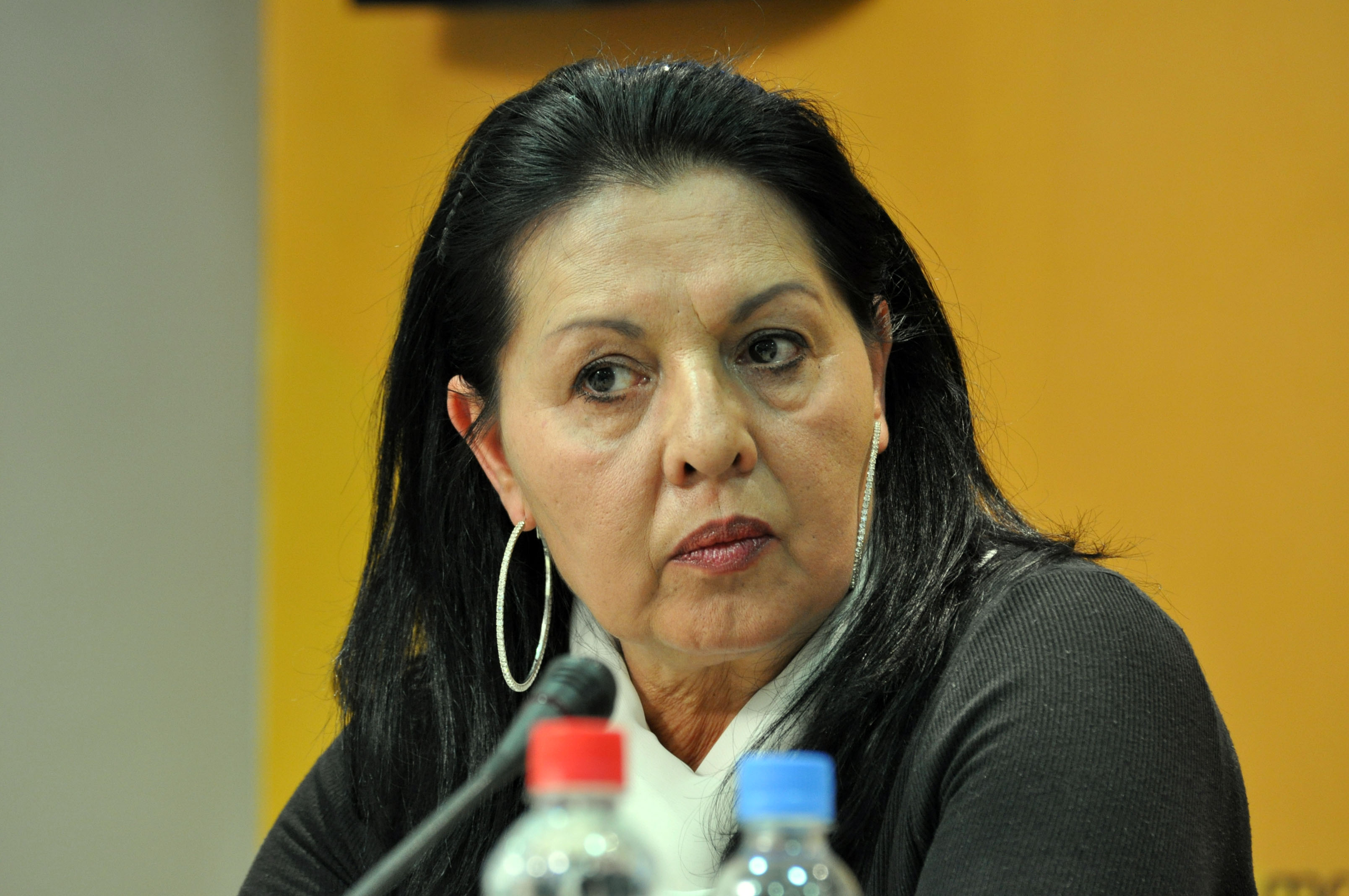 Уснија Реџепова ромска певачица